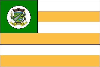 Bandeira do município goiano Acreúna